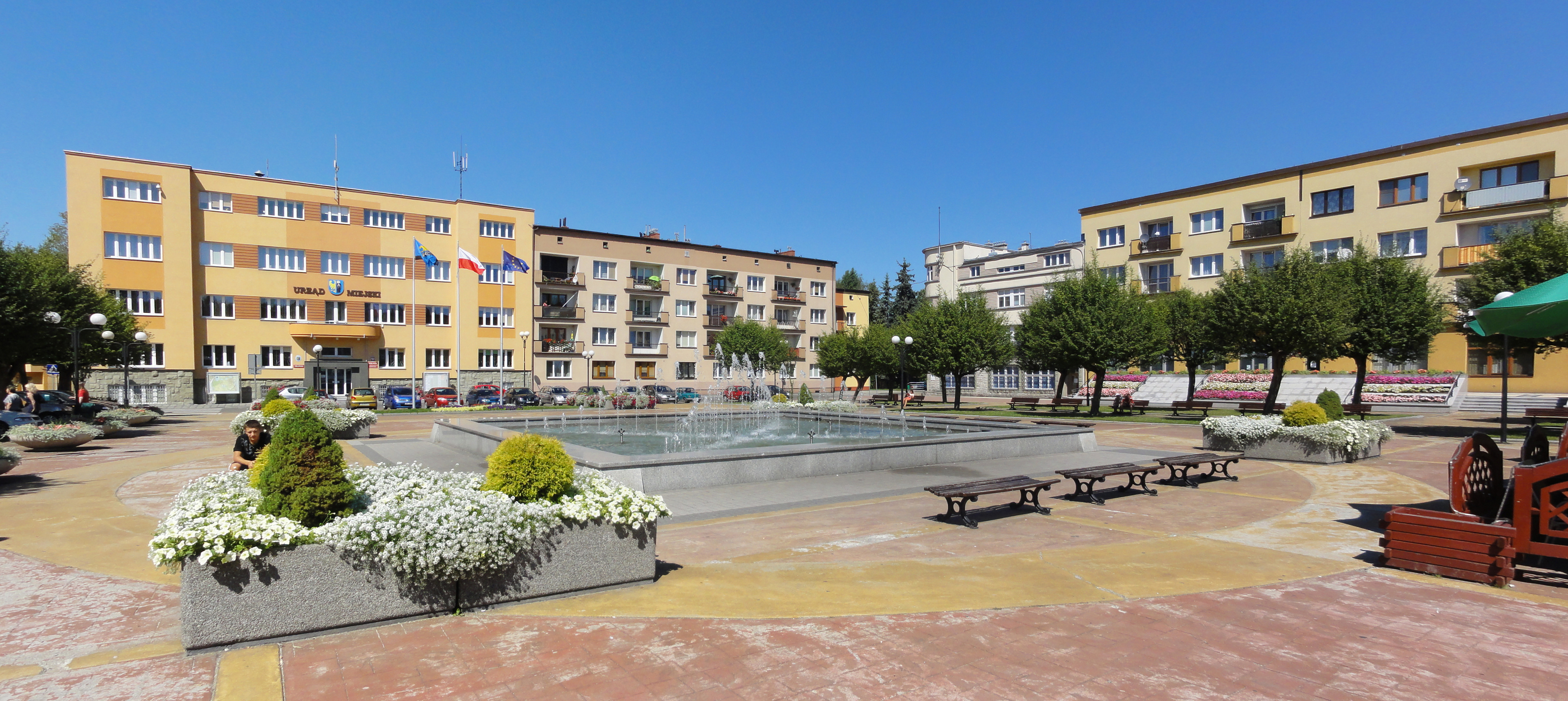 Plac Jana Pawła II w Czechowicach-Dziedzicach